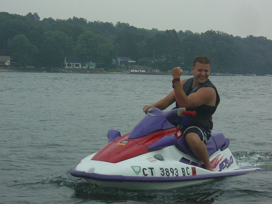 Scott Cieslak on a 1997 Kawasaki ZXi.